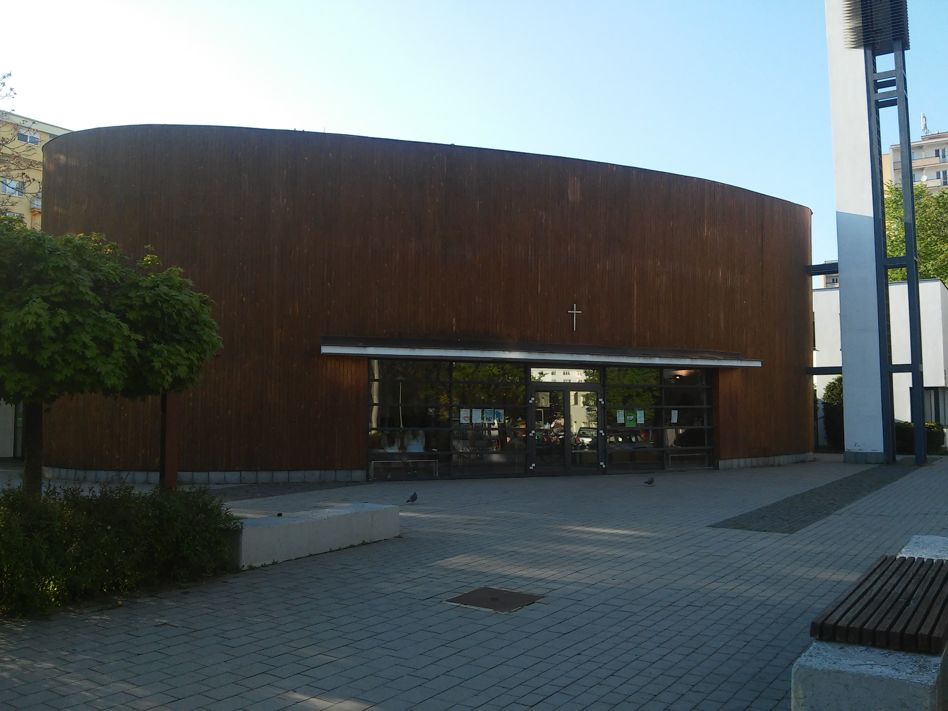 Rímskokatolícke pastoračné centrum Kráľovnej rodiny, Bratislava